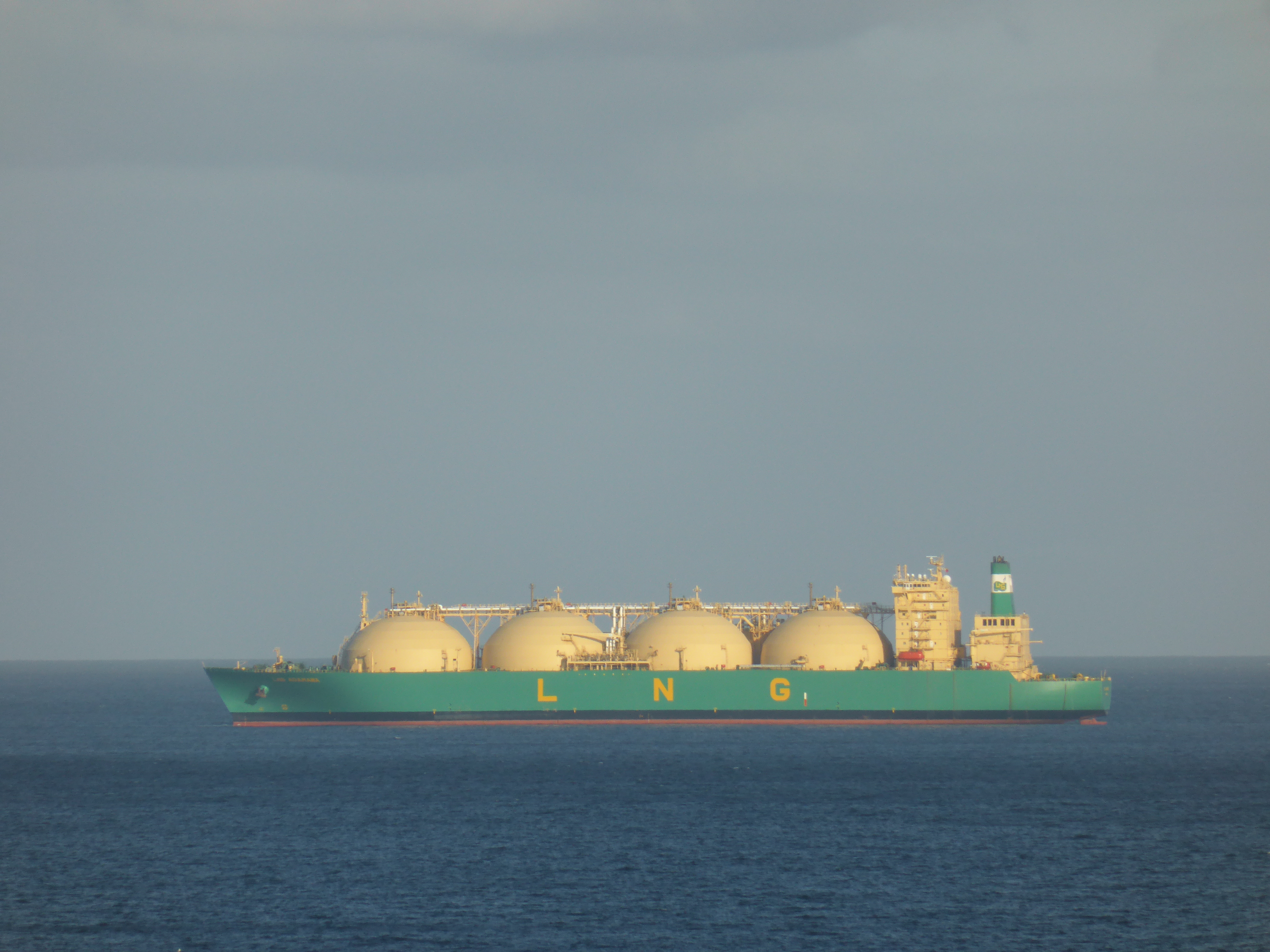 Metanero de 289 metros de eslora, fondeado en la bahía de Santa Cruz de Tenerife (ZONA DE FONDEO 2), para embarque de fuel-oil. Buque cisterna, de transporte de gas licuado. IMO: 9262211